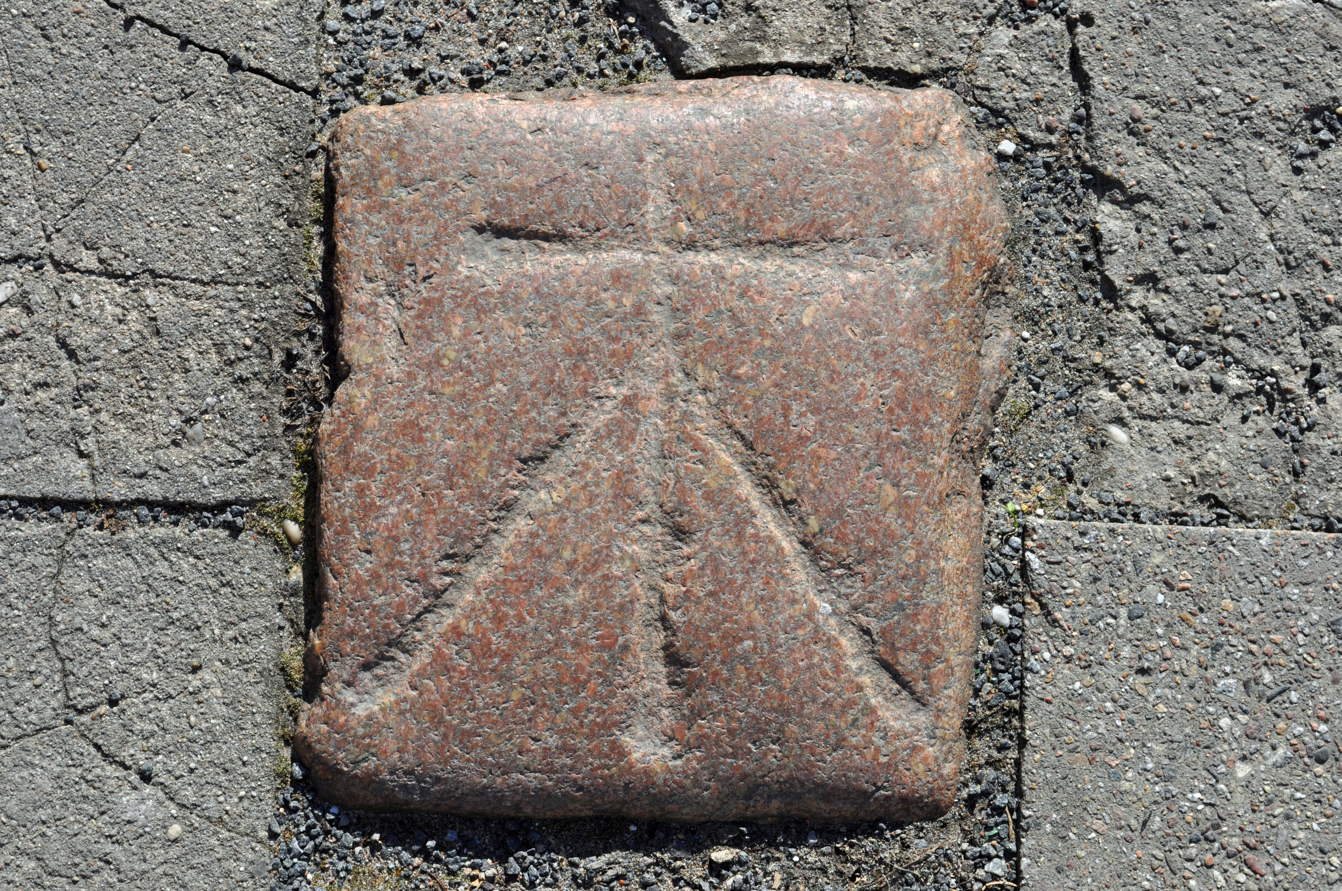 Gebäude bzw. Gebäudedetail in Stralsund. Straße und Hausnummer siehe Dateiname. Der Stein ist als Baudenkmal ausgewiesen, siehe dazu die Liste der Baudenkmale in Stralsund.